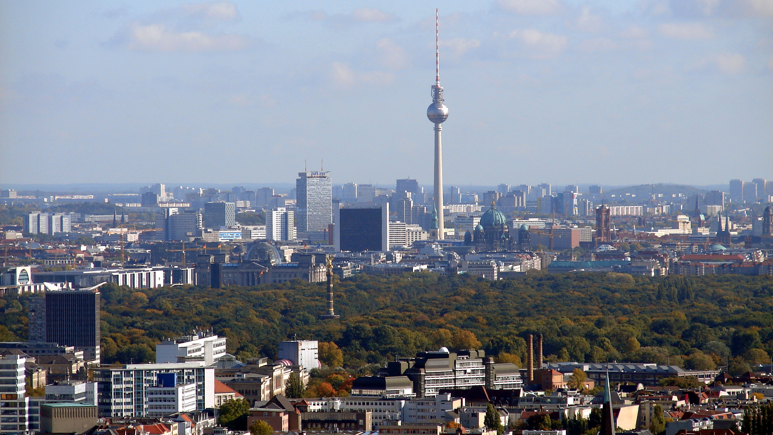 Skyline vom Berliner Funkturm.